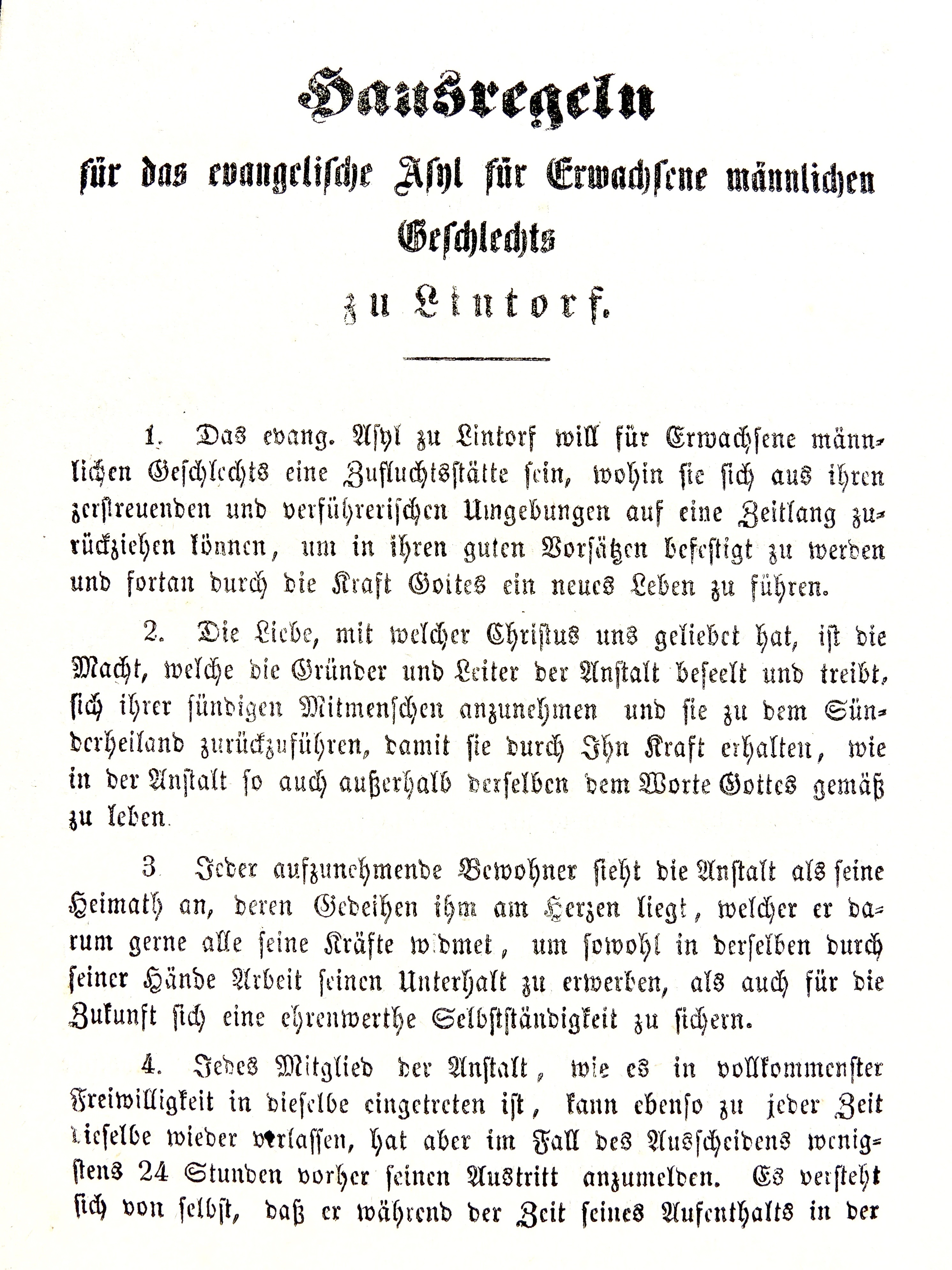 Originalformular der Hausregeln des Asyls für verwahrloste männliche Erwachsene von 1851 in Lintorf